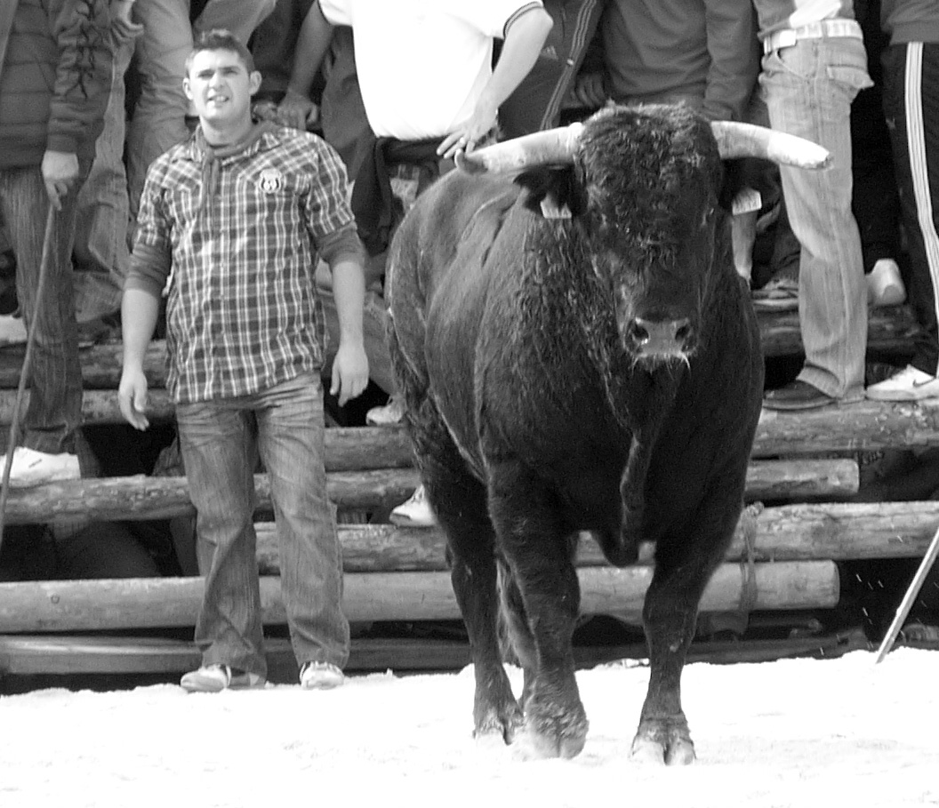 Corrida de toros en Lapeza (Granada, España)